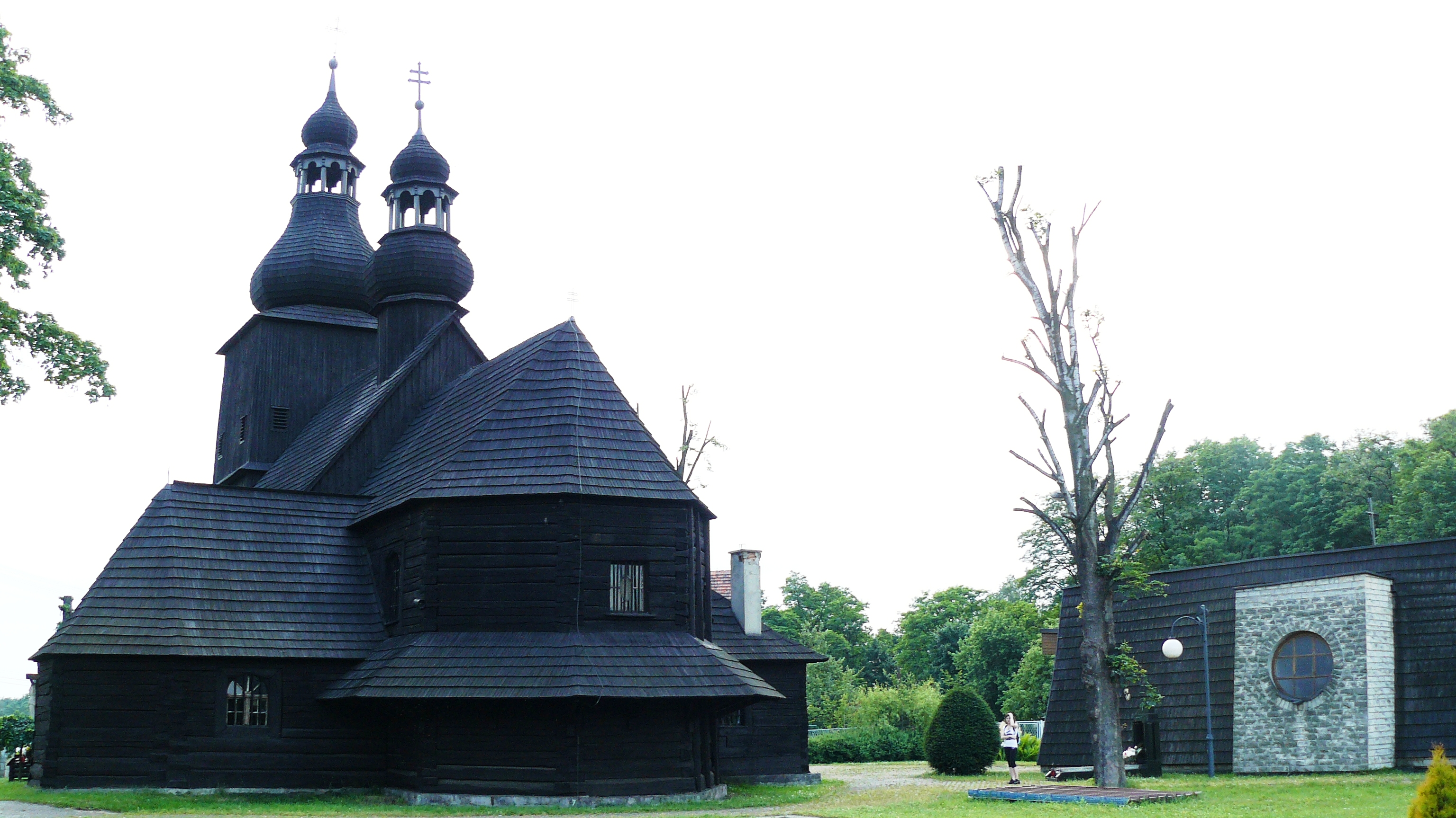 Mikołów, kościół par. pw. św. Mikołaja, 1720, 1947